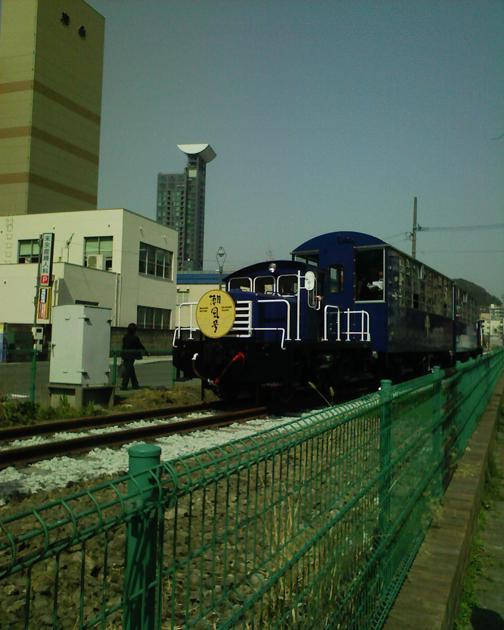 福岡県北九州市門司区に2009年4月開業予定の、平成筑豊鉄道門司港レトロ観光線(やまぎんレトロライン)に使用される車両(機関車DB10+客車トラ700)の走行の様子。 九州鉄道記念館～出光美術館間にて撮影 (写真は試運転中のもの) ※良い写真をお持ちの方は差し替えてください。